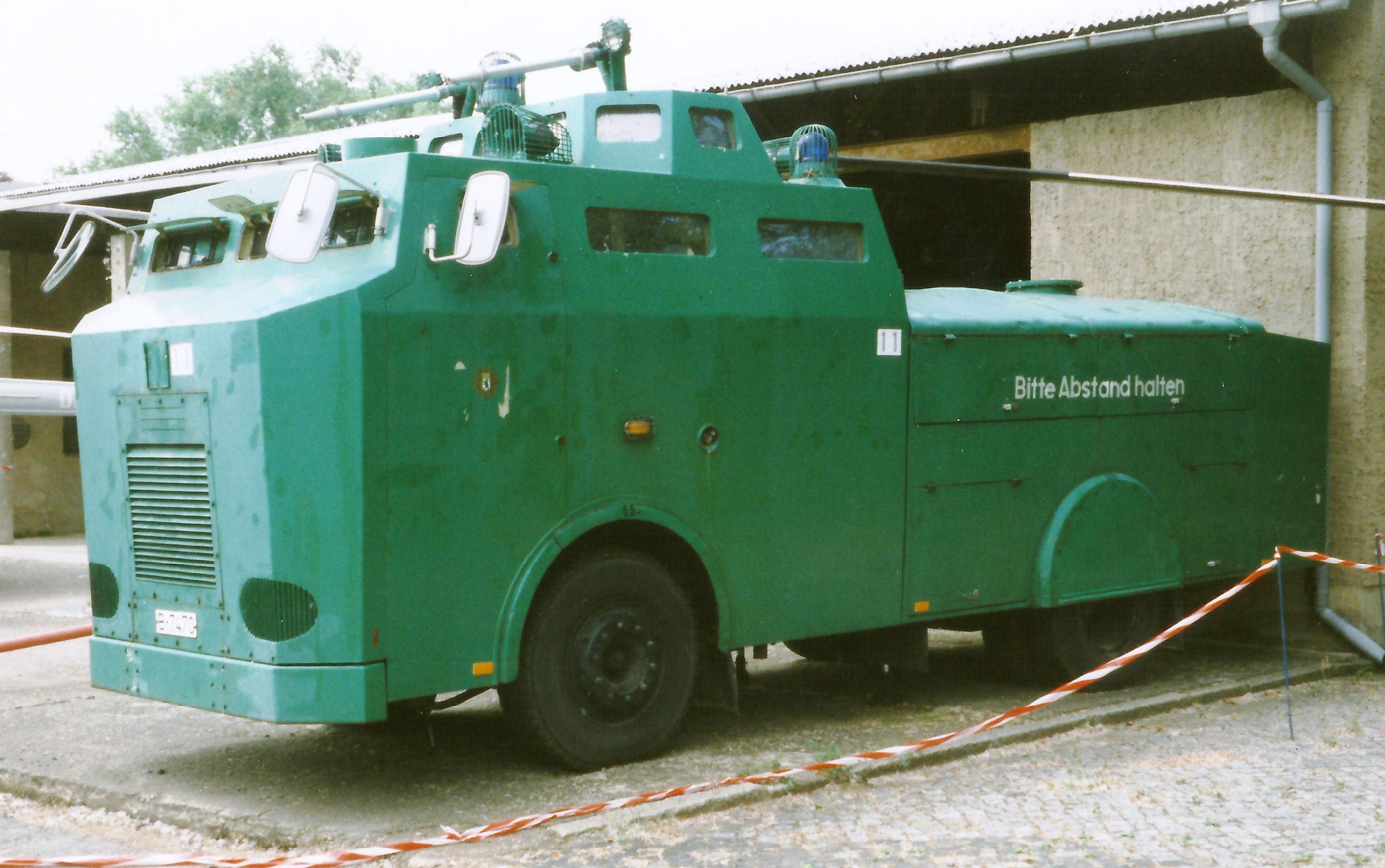 Duitse waterwerper